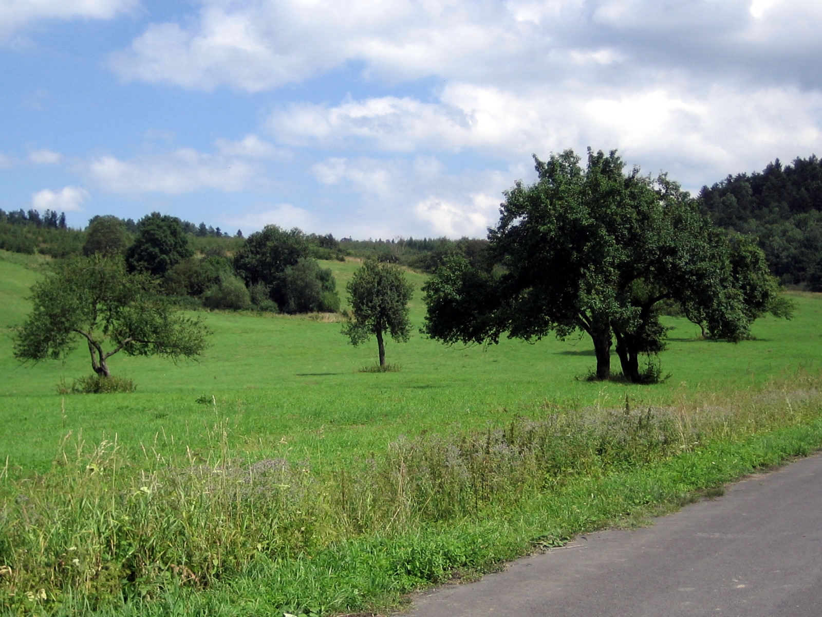 Grąziowa - tu była wieś.